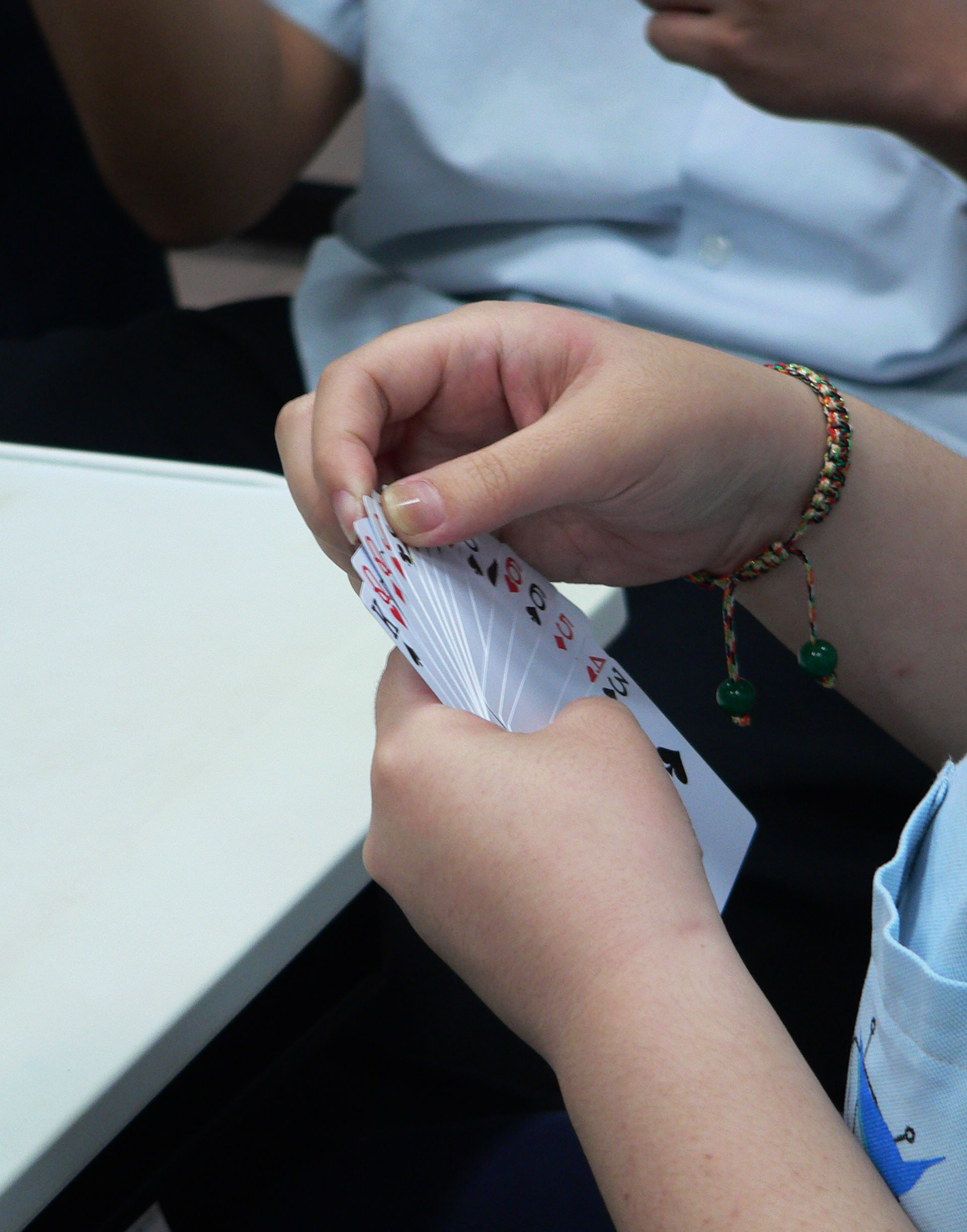 Daifugō ?